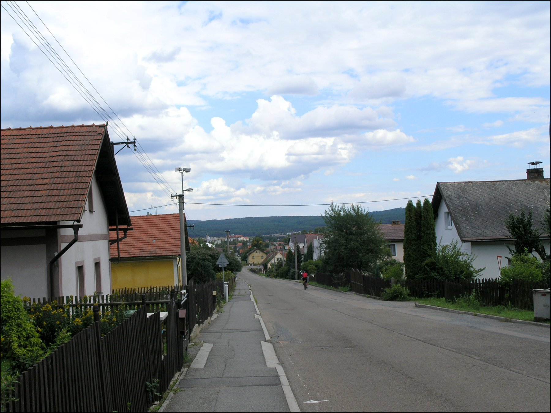 Žihle (okres Plzeň-Sever)